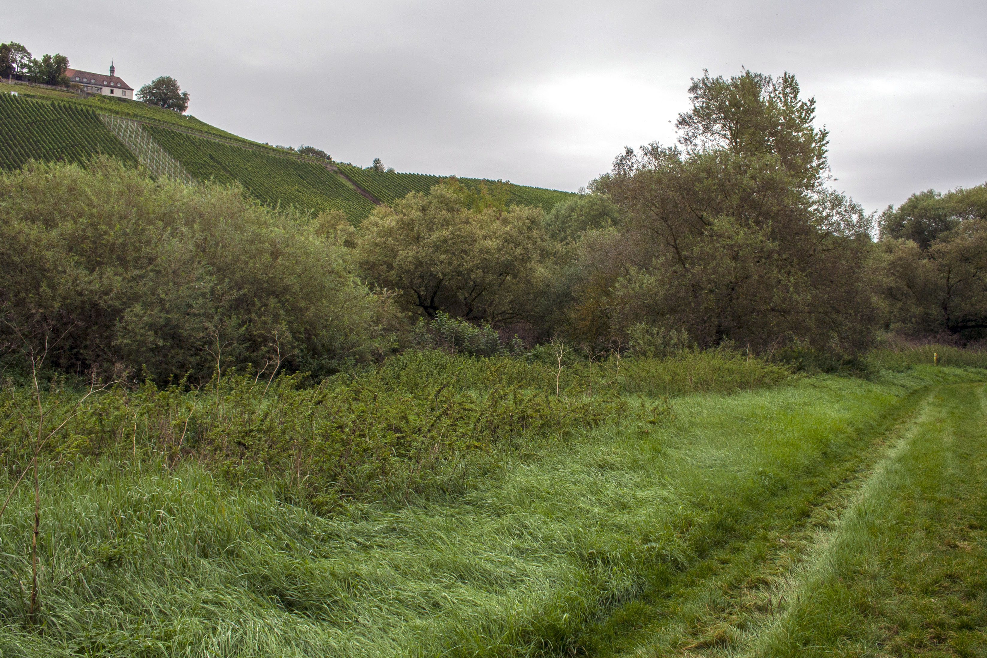 Naturschutzgebiet, Main, Nordheim